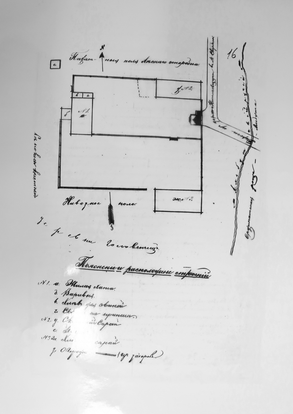 Беларуская (тарашкевіца): Альбуць (Albuć), плян лесьнічоўкі